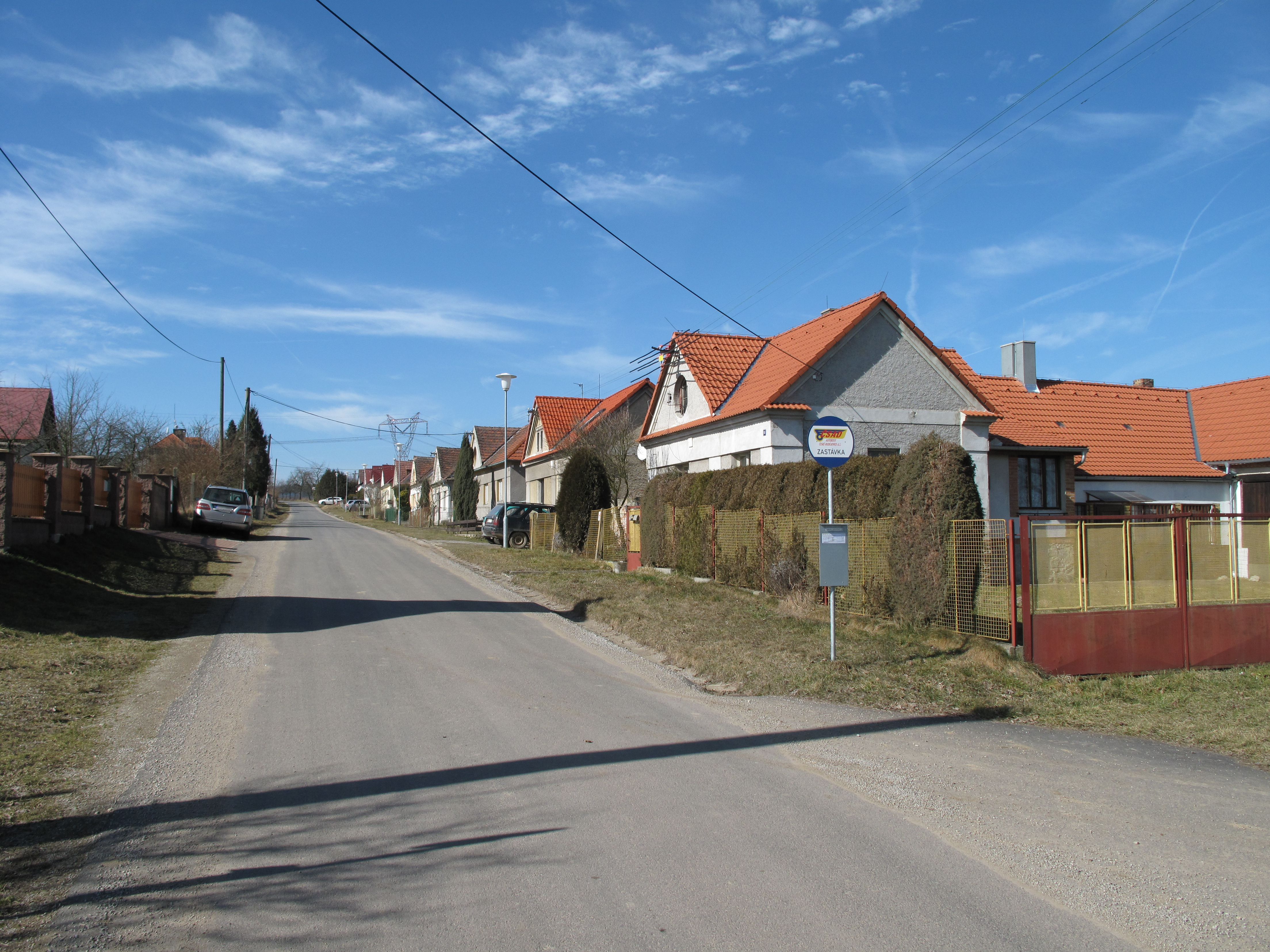 Silnice v Holečkově. Okres Prachatice, Česká republika.